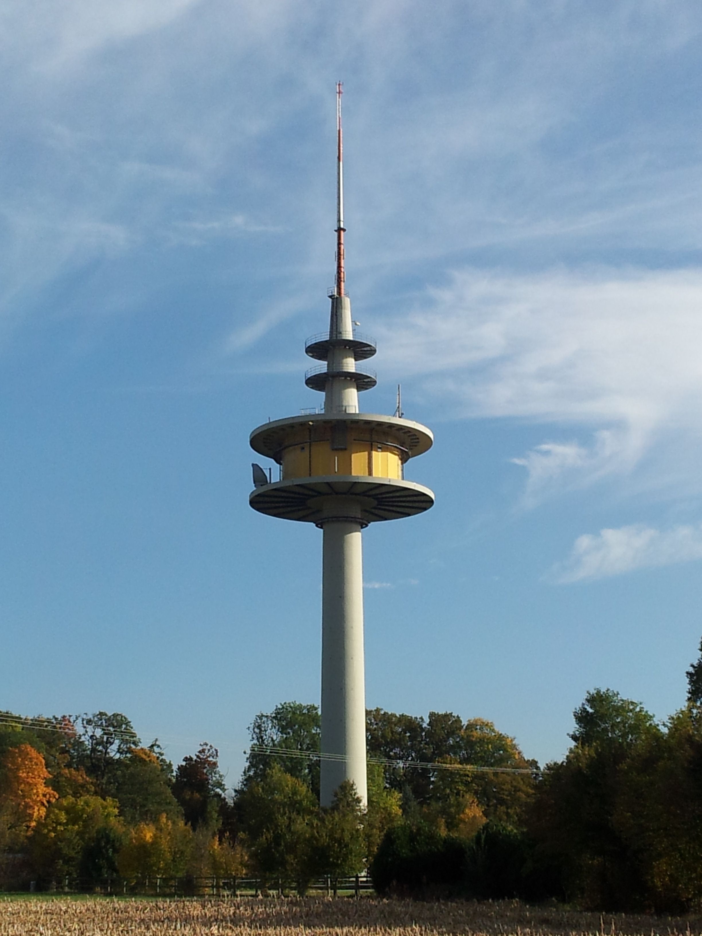 Fernmeldeturm Willstätt, Ortenaukreis, Baden-Württemberg, Deutschland